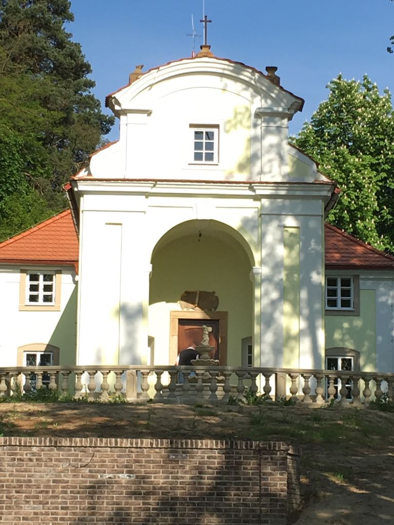 Kaple po renovaci v roce 2018